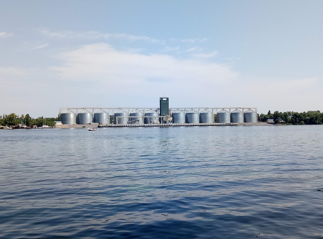 Нібулон у Кременчуці